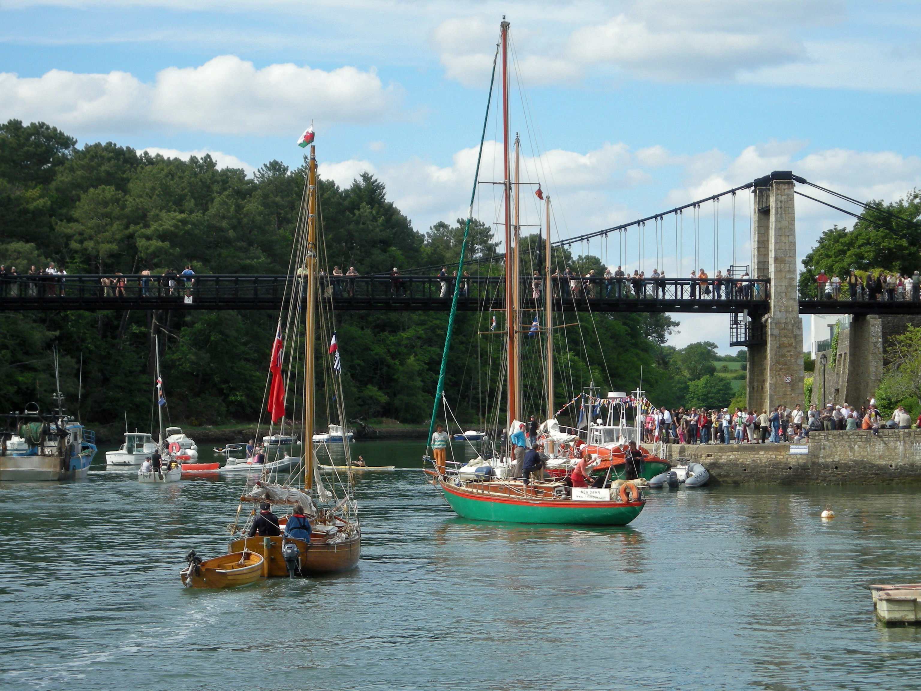 Entrée du Port du Bono durant la semaine du Golfe 2009. Prise de vue vers l'amont, depuis la rive gauche de la rivière du Bono.